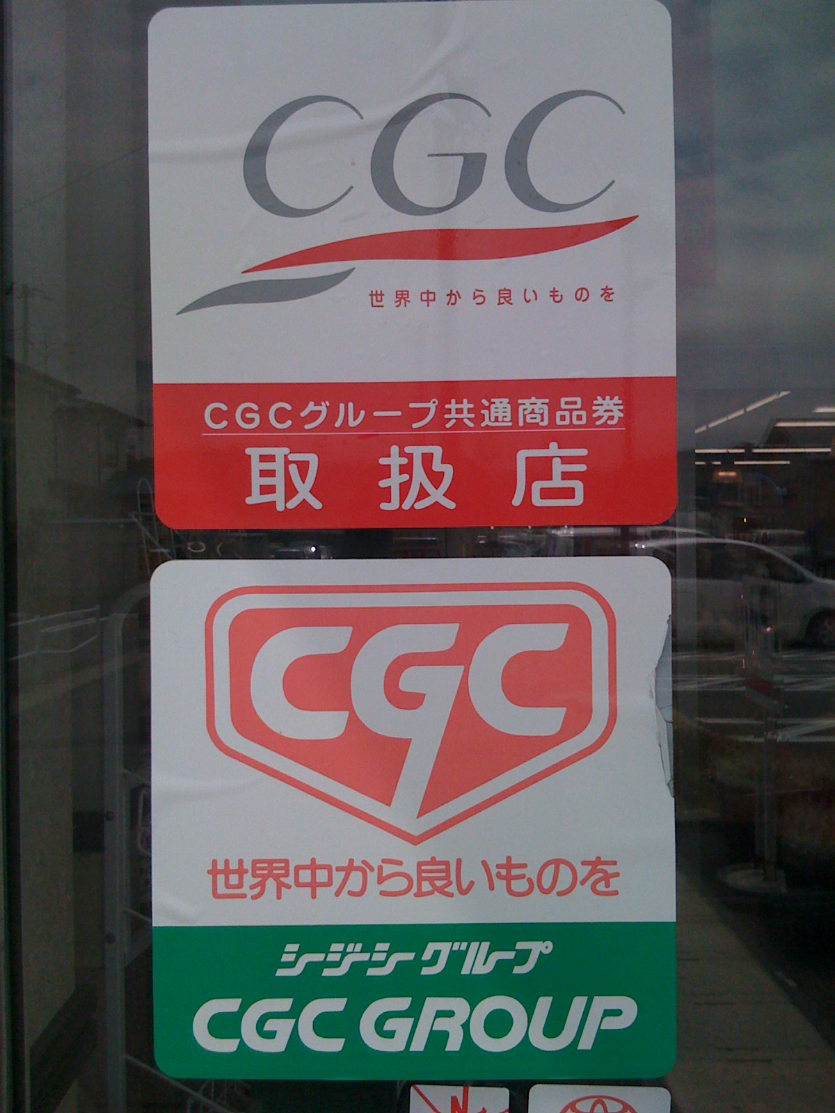 CGC加盟店のステッカー。2008年7月、ジョイス宮古千徳店にて撮影